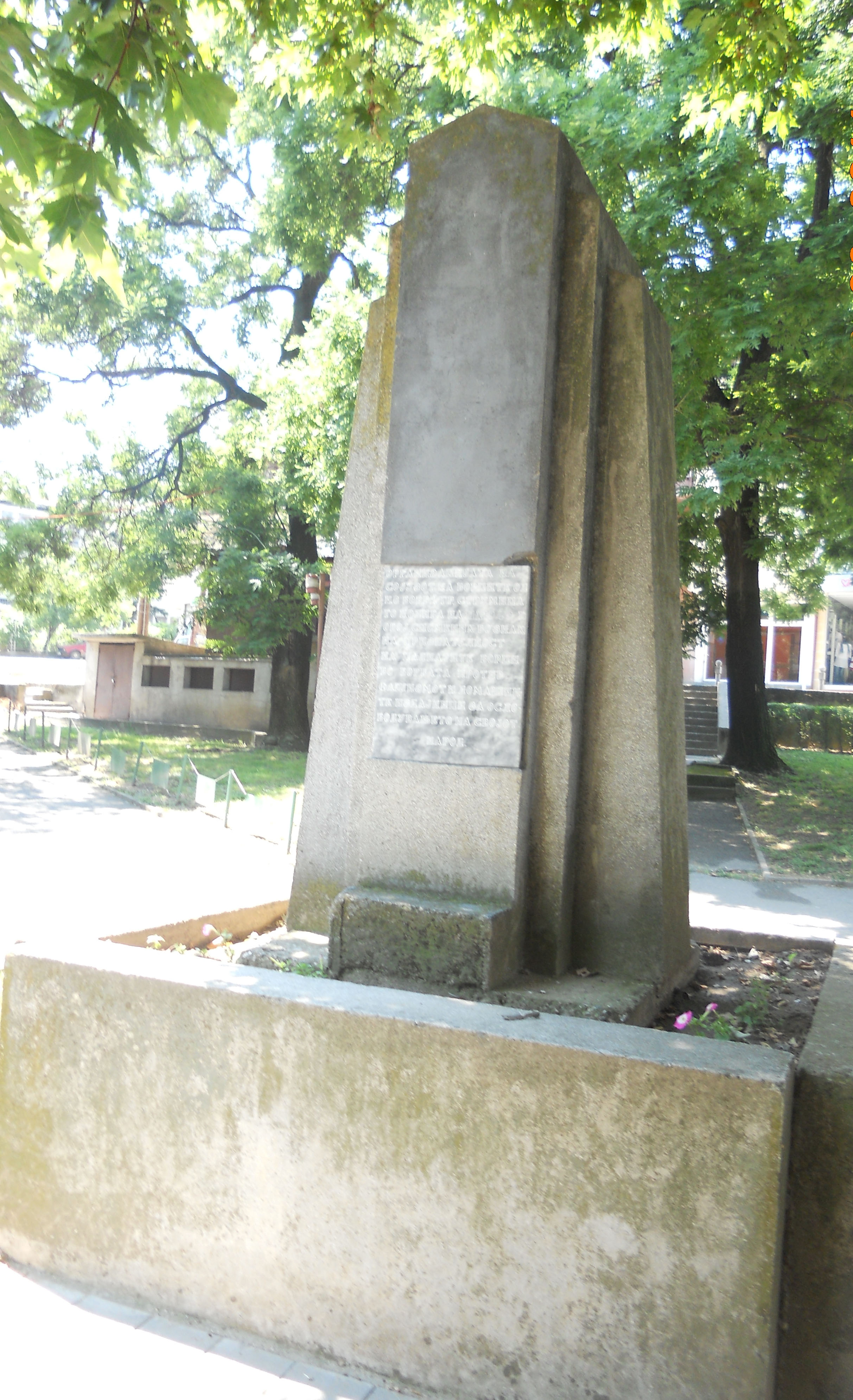 Споменик „11 Октомври“ - Струмица